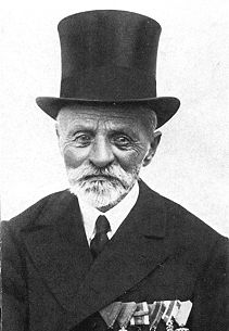 Fotografía de Johann Loschek, ayuda de cámara de Rodolfo de Habsburgo.